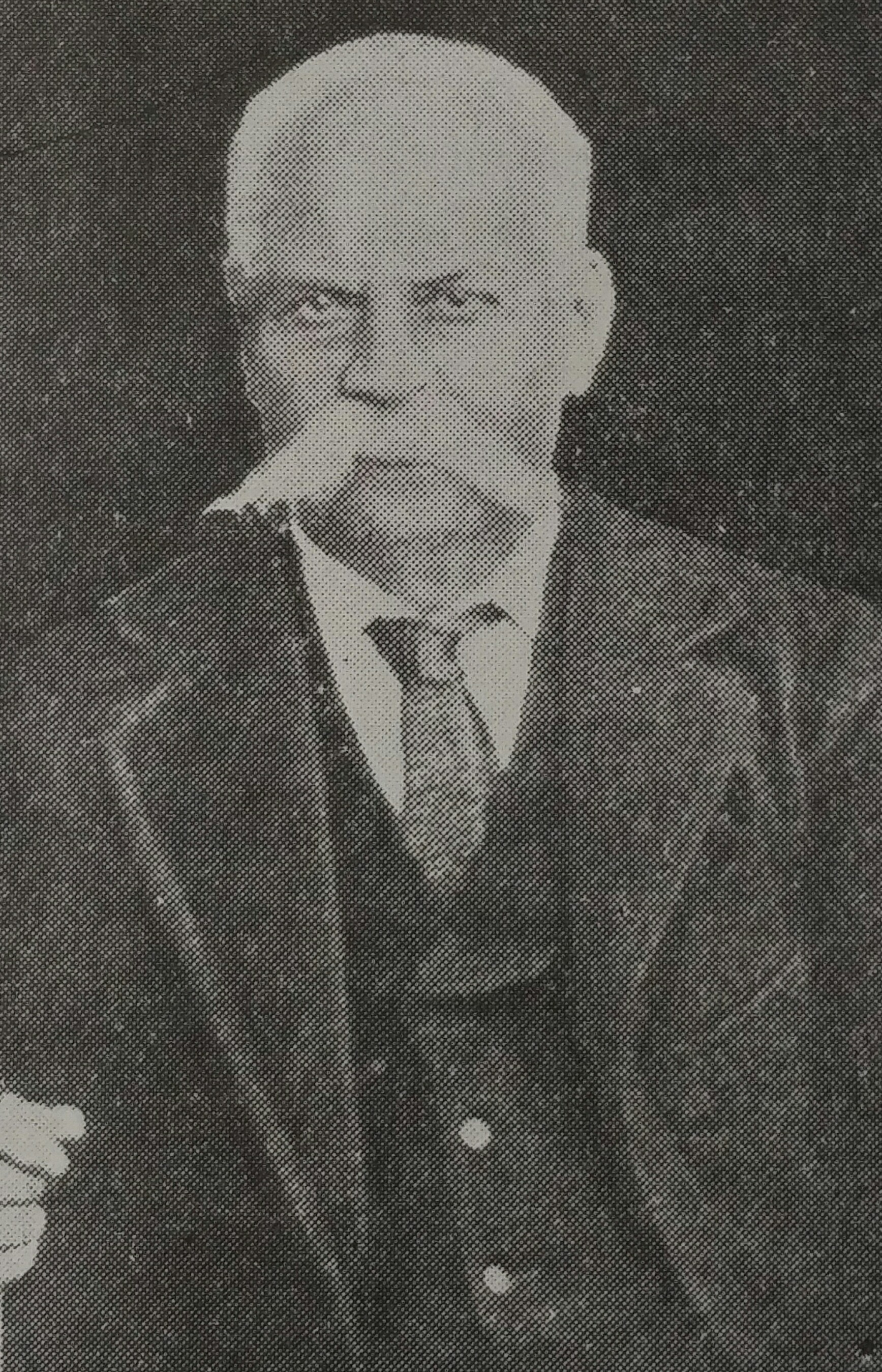 Fotografía de Severiano Talamante.